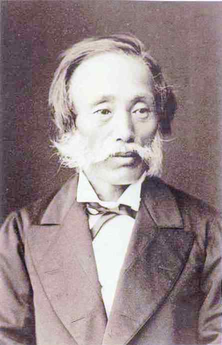 Yoshii Tomozane, japanischer Politiker